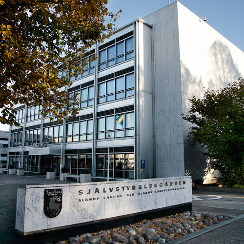 Självstyrelsegården